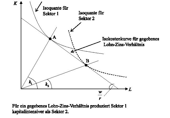 grafische Darstellung des Heckscher-Ohlin-Modells